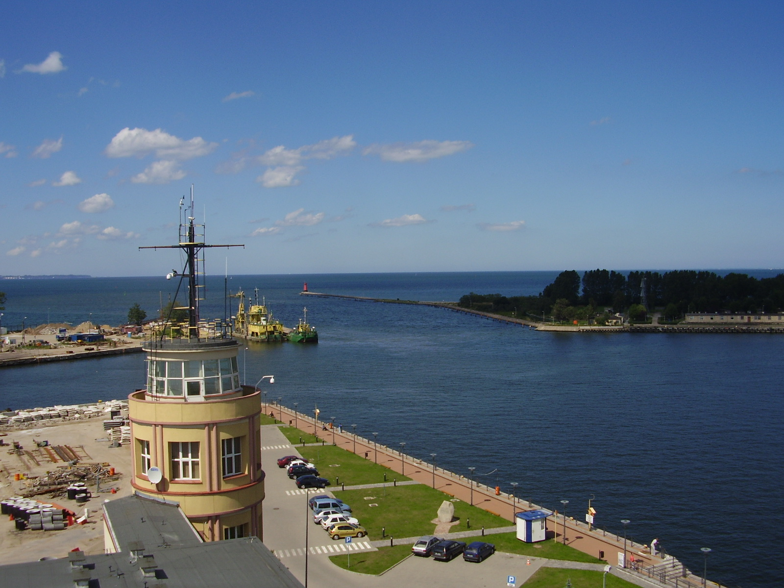 Port of Gdańsk / Kapitanat portu, Kanał Portowy i Nabrzeże Ziółkowskiego w Gdańsku Nowym Porcie.